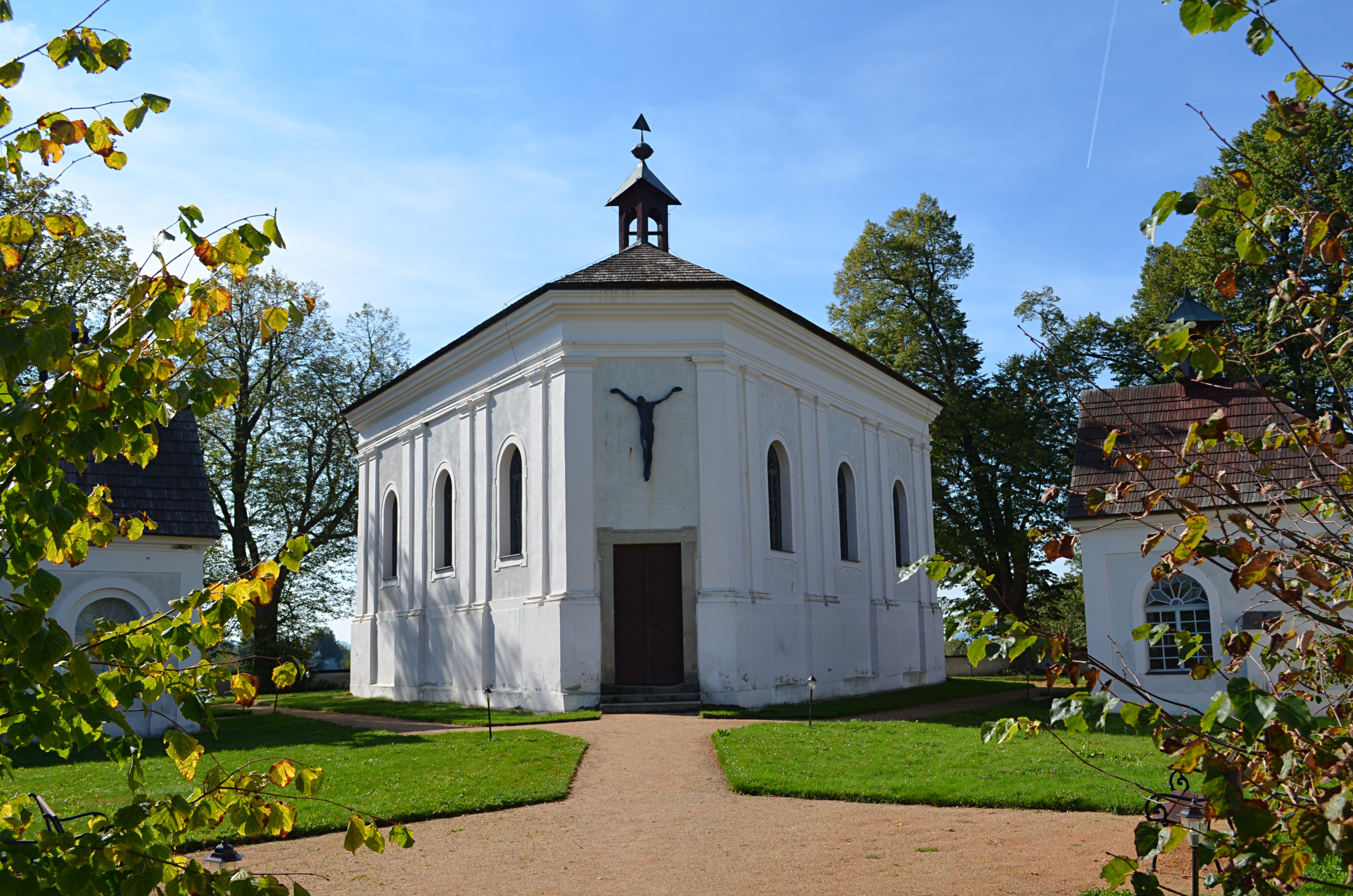 Kostel Nejsvětější Trojice, Andělská Hora (okres Karlovy Vary).